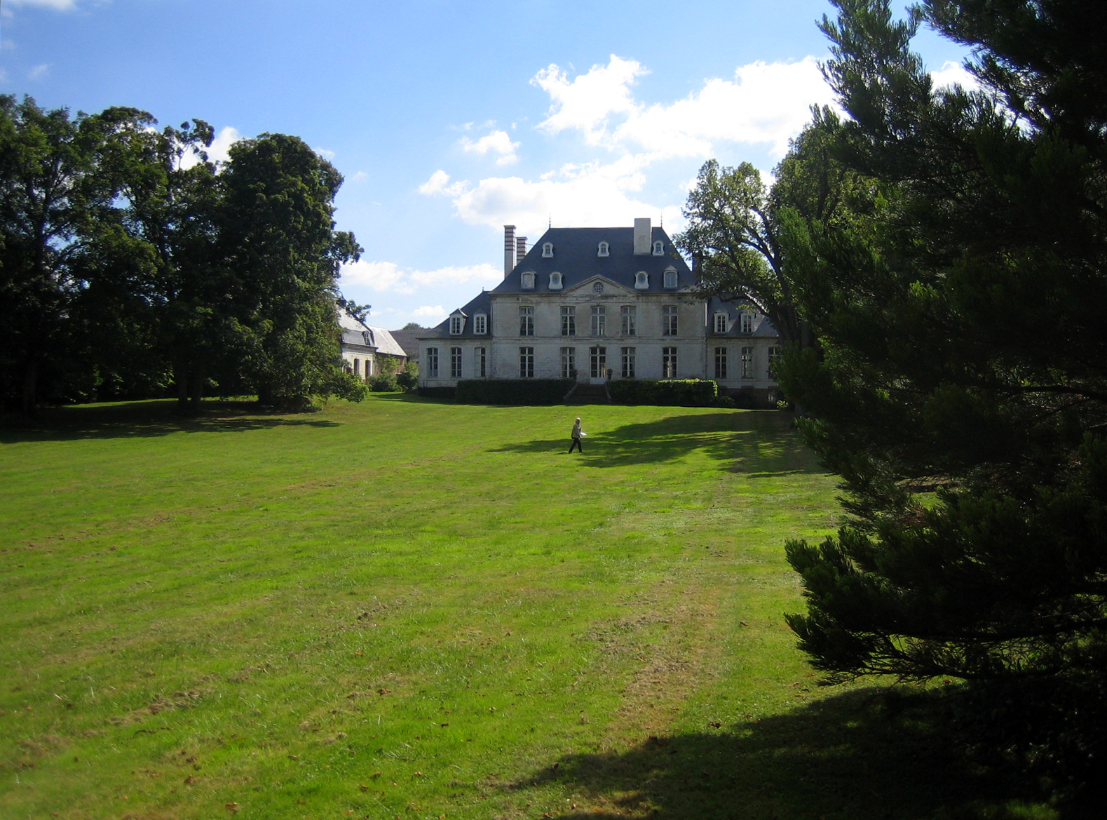 Creuse (Somme, France) - Le château (façade donnant sur le parc). .